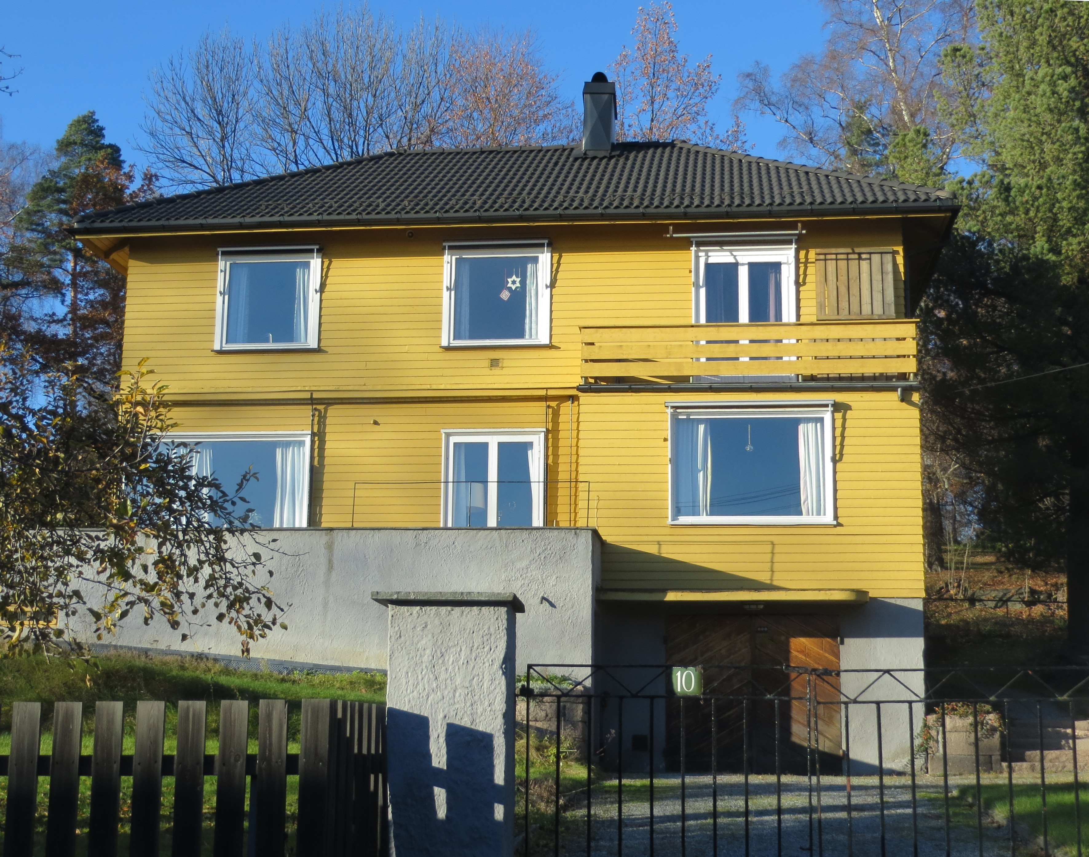 Gjøaveien på Smestad har en rekke bygningsvernede villaer, som representanter for etterkrigstidens funksjonalistiske boligstil. Bydel Vestre Aker, Oslo.